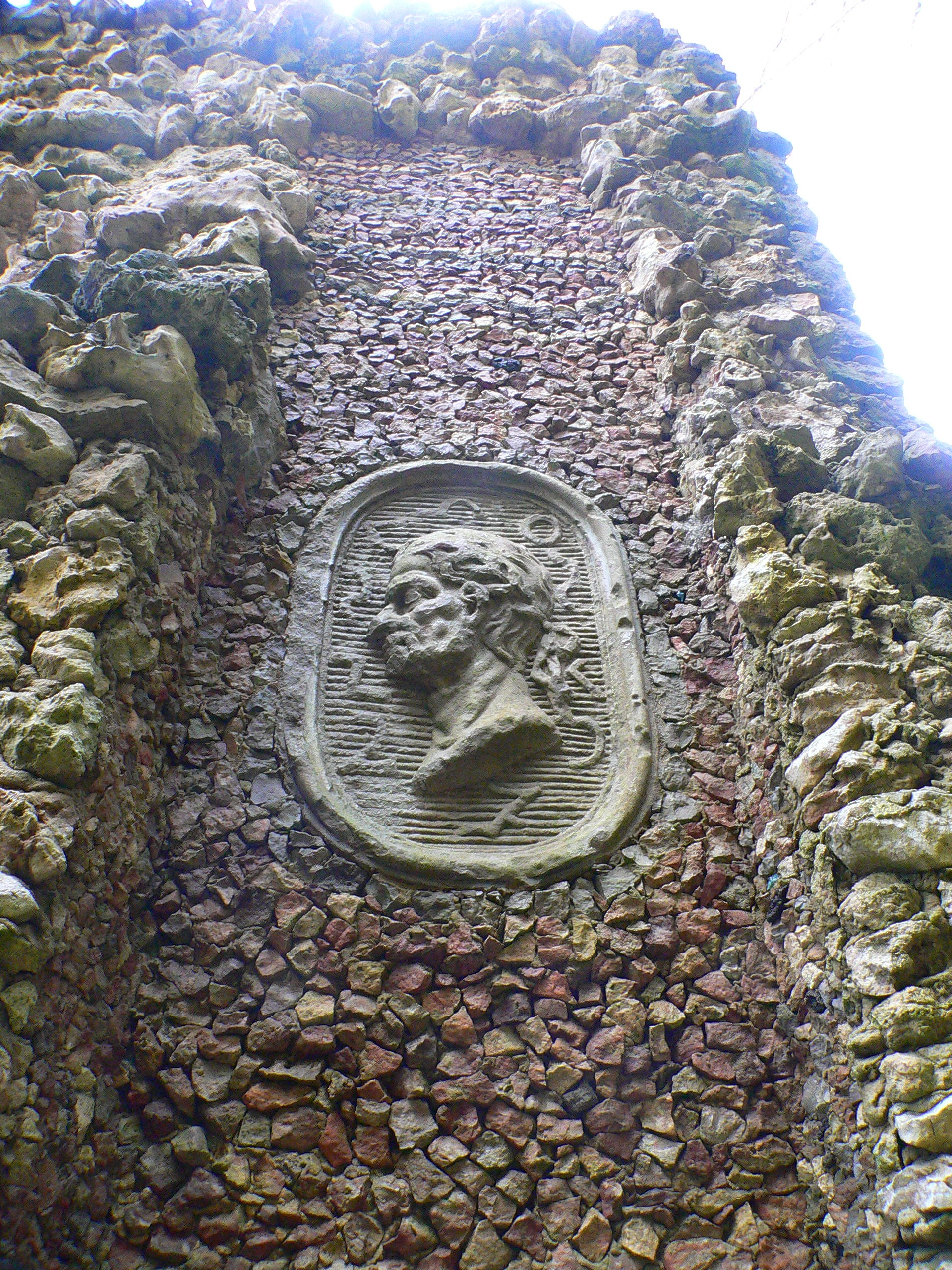 Bildnis des Vergil auf der vorderen Sofitte des Ruinentheaters im Felsengarten Sanspareil, Gemeinde Wonsees, Oberfranken, Bayern.